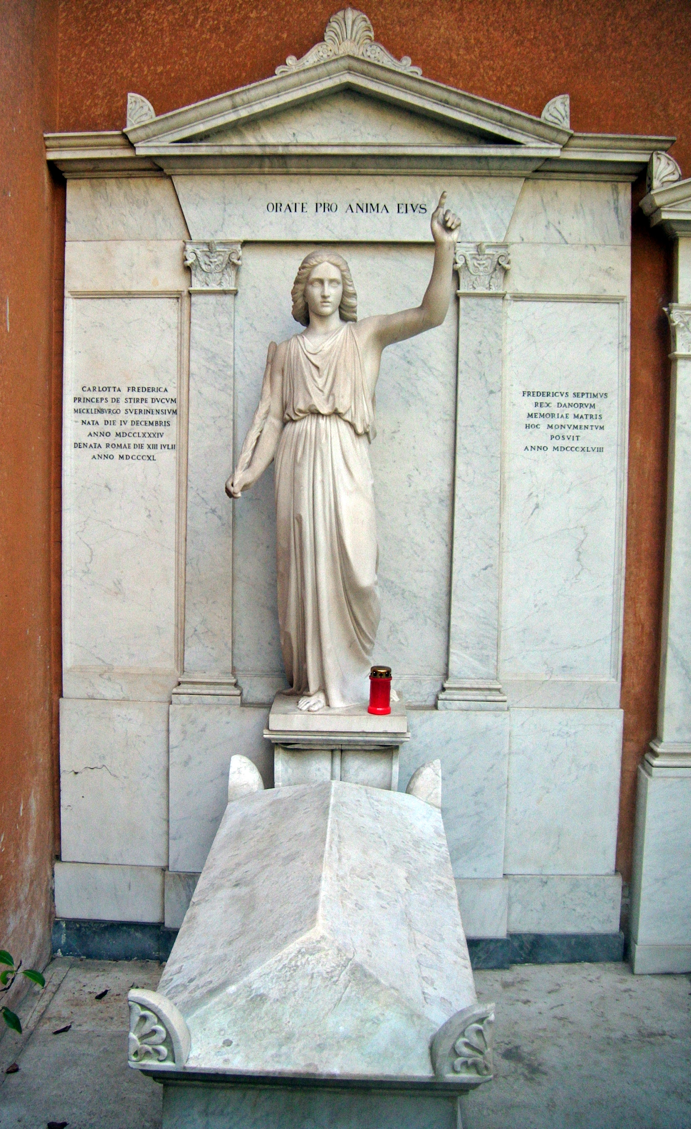 Grab Charlotte Friederike zu Mecklenburg (1784-1840), Campo Santo Teutonico, Rom, geschaffen von Jens Adolf Jerichau